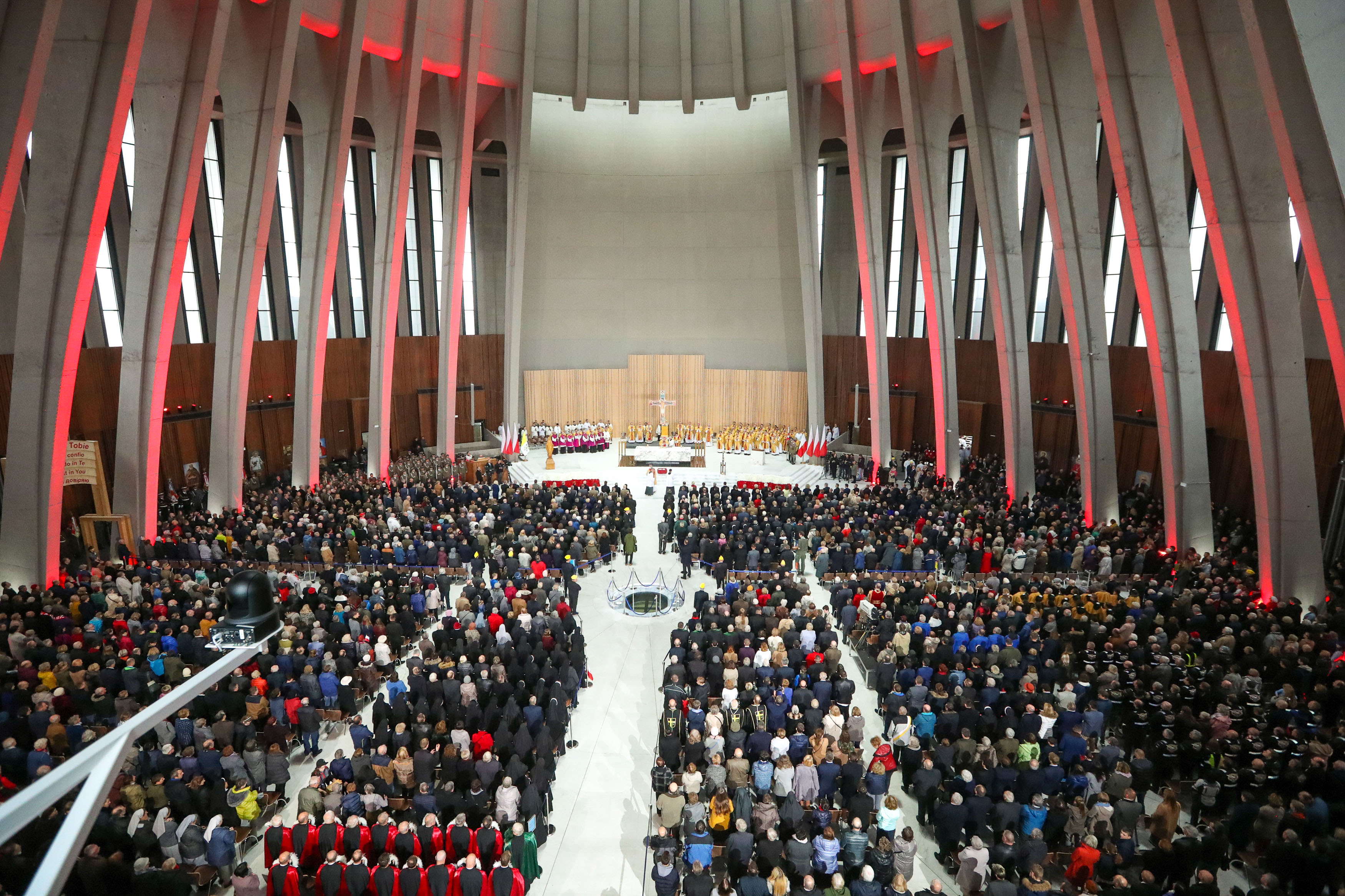 11/11/2018 Obchody 100. rocznicy odzyskania niepodległości Rzeczypospolitej Polskiej. Msza św. za Ojczyznę. Autorem fotografii jest Grzegorz Jakubowski. Obchody odbyły się w Świątyni Opatrzności Bożej w Warszawie zaprojektowanej przez "Szymborski i Szymborski Architekci".